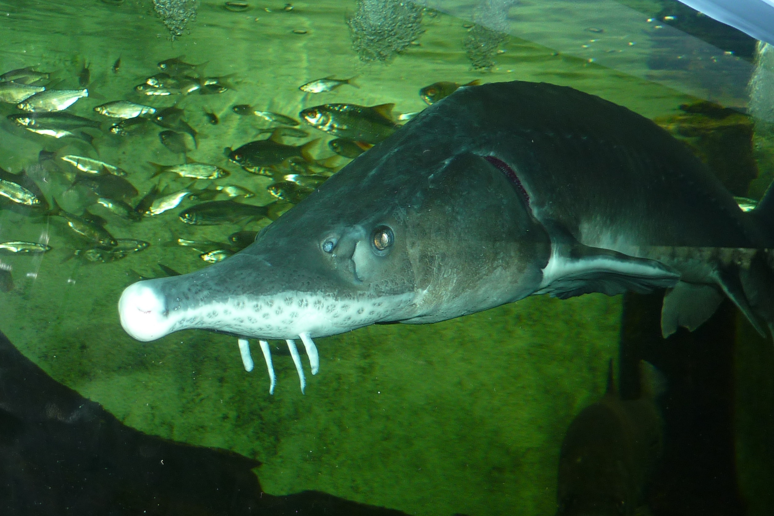 Sibirischer Stör (Acipenser baerii)